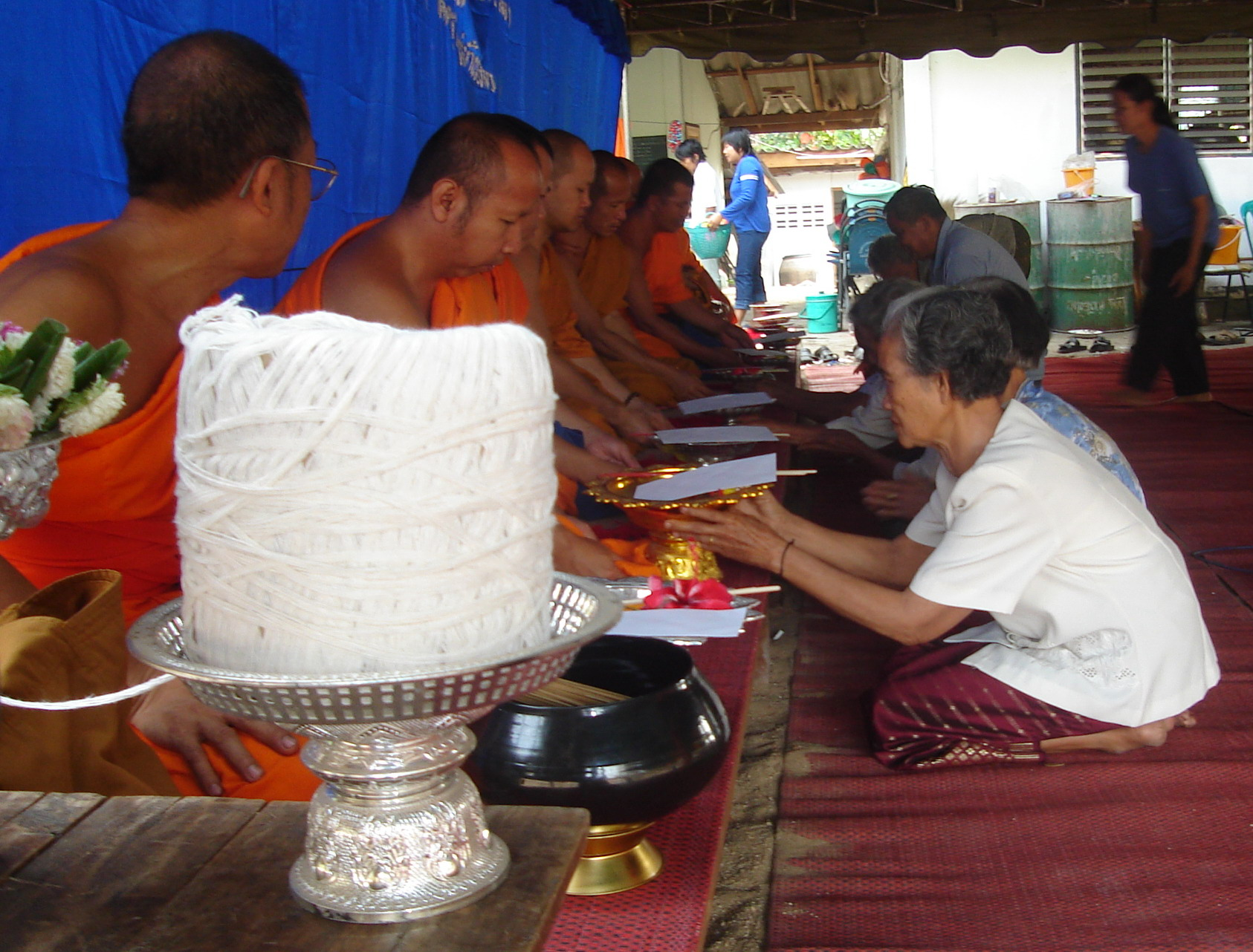 ชาวพุทธถวายจตุปัจจัยแด่พระสงฆ์